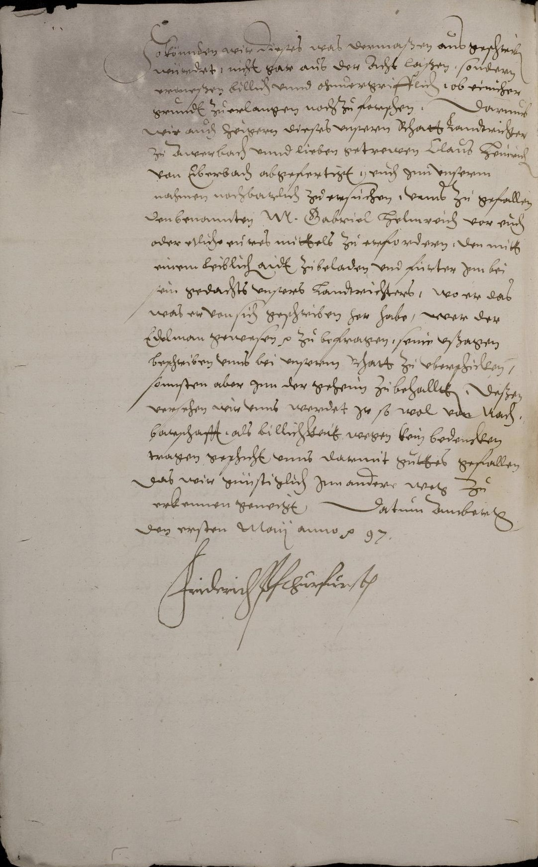 Codex Palatinus germanicus 8, Blatt 78v der Handschrift (Seite 2 v. 2) : Brief Kurfürst Friedrichs IV. von der Pfalz an den Bürgermeister und den Rat der Stadt Nürnberg; Amberg, 1. Mai 1597 (Original, eigenhändige Unterschrift Friedrichs, Siegel erhalten).